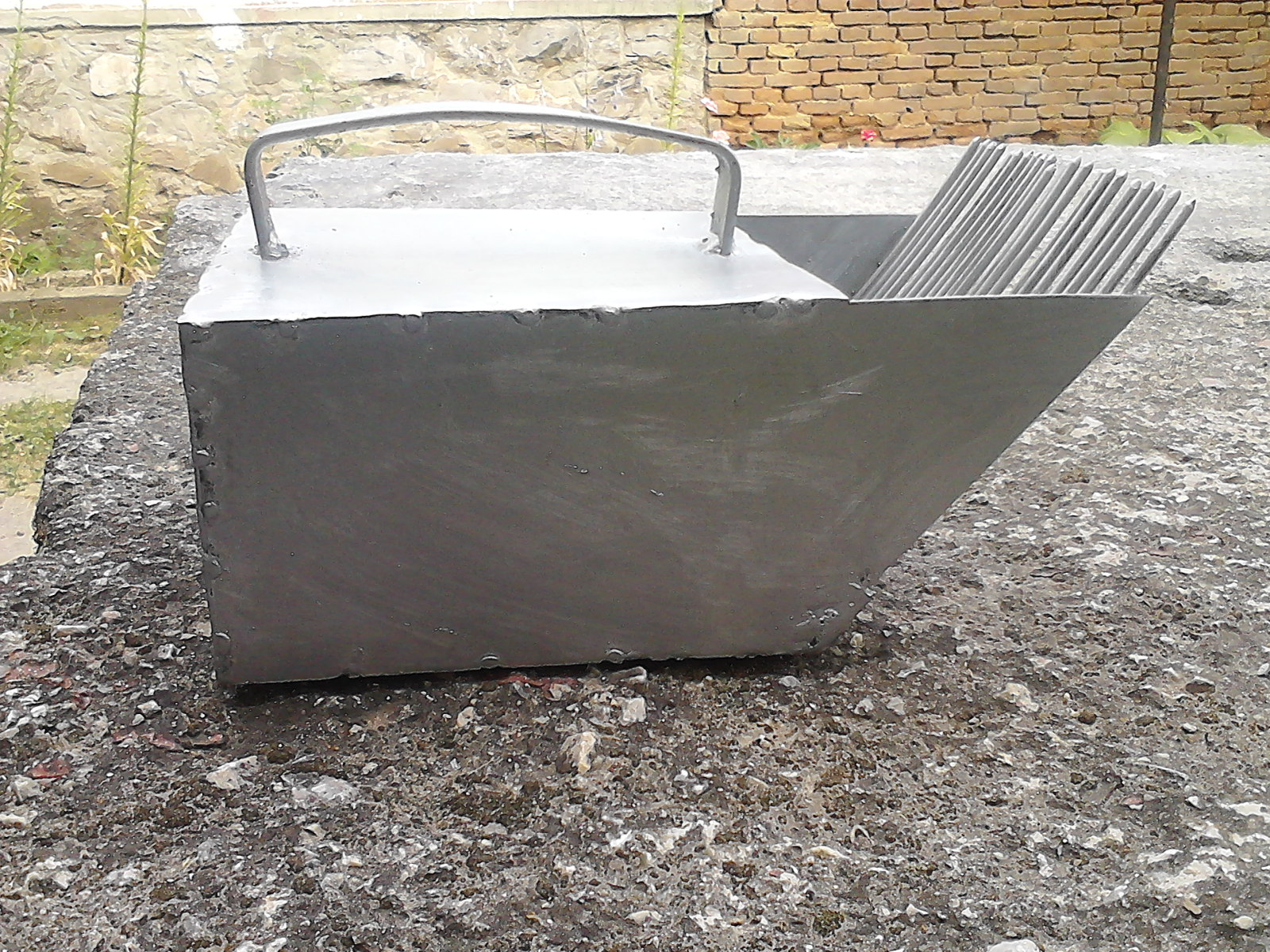 pieptene pentru cules afine cu dintii orientati la 45 grade